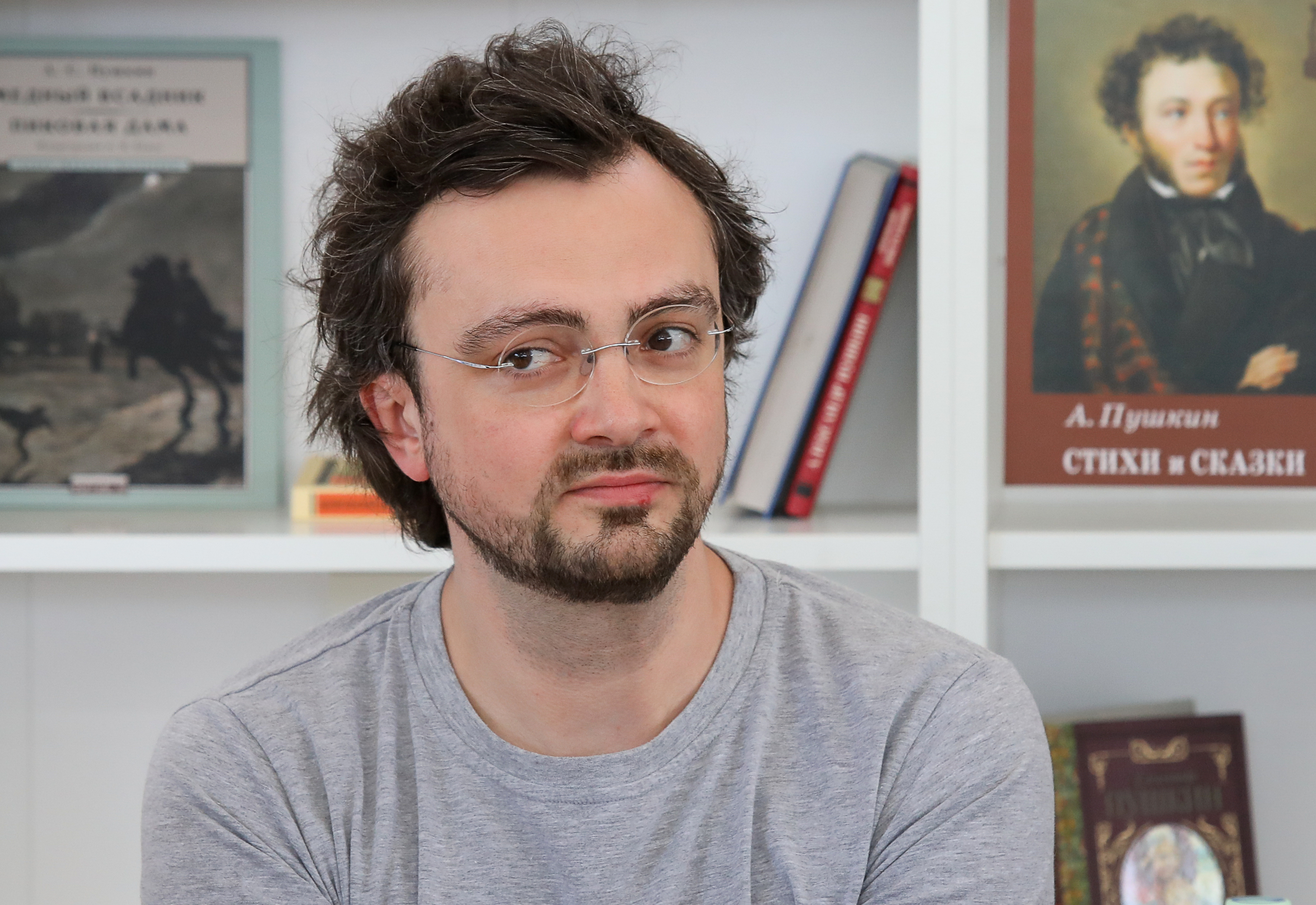 Писатель Вадим Левенталь на книжном фестивале «Красная площадь» 2019.